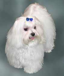 Maltezer